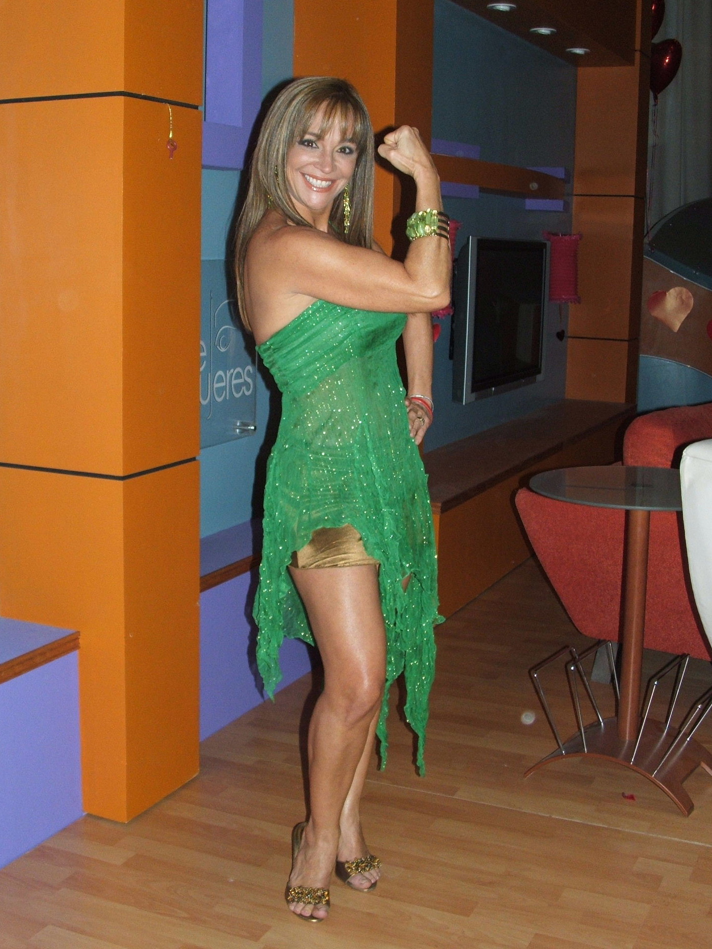 Yolandita Monge